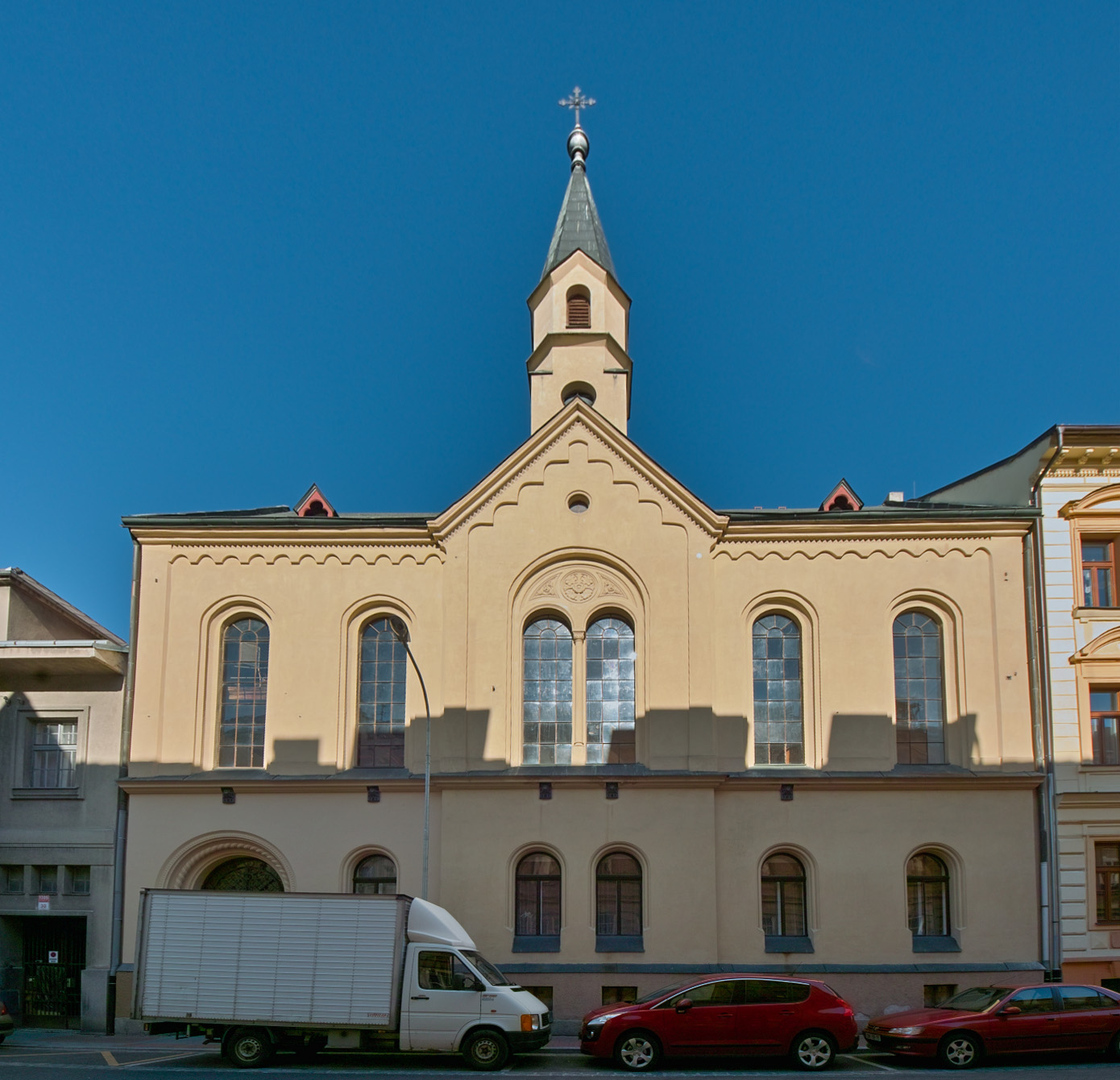 Kostel Českobratrské církve evangelické, třída 28. října 26, České Budějovice